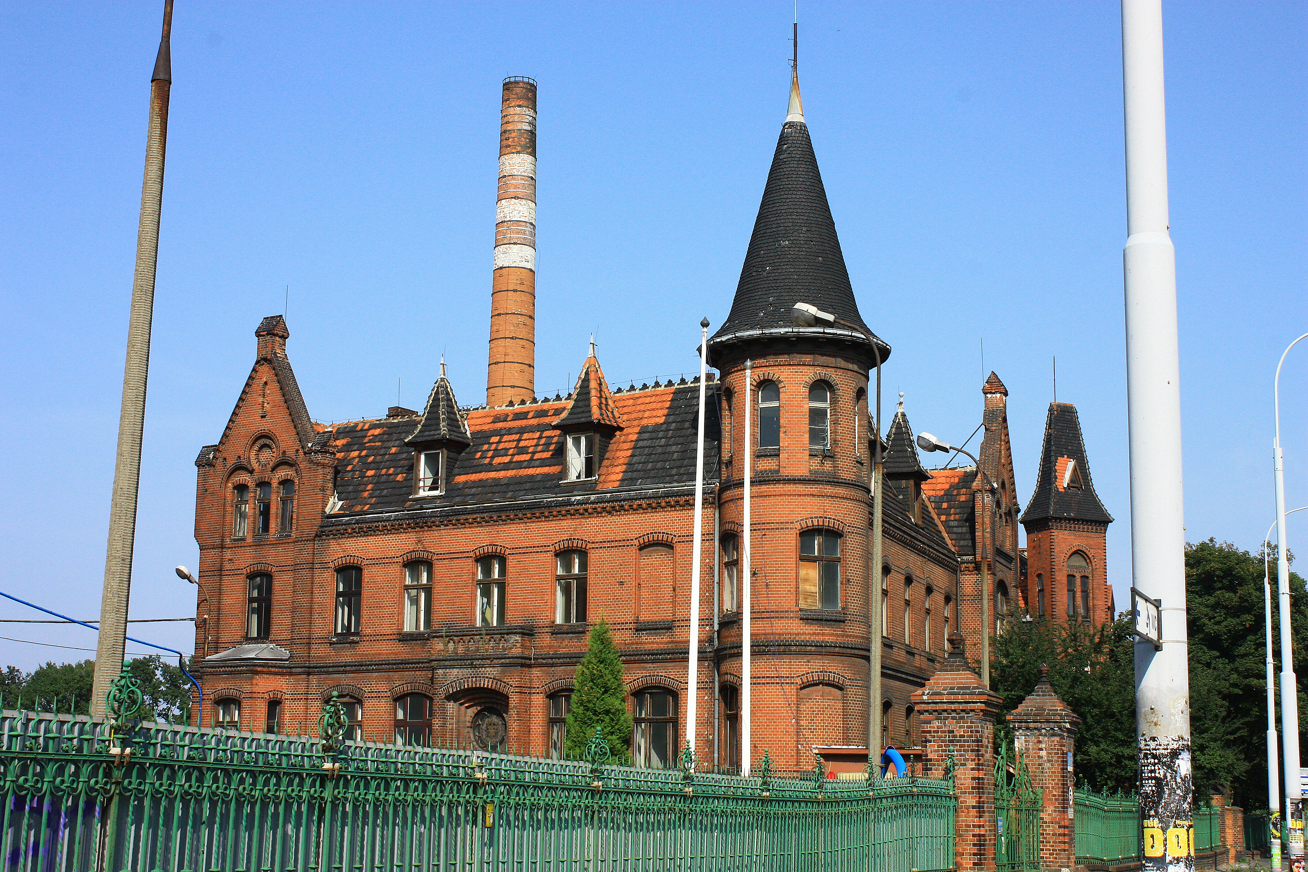 Wrocław, zespół Browarów Dolnośląckich PIAST, 1891-1894